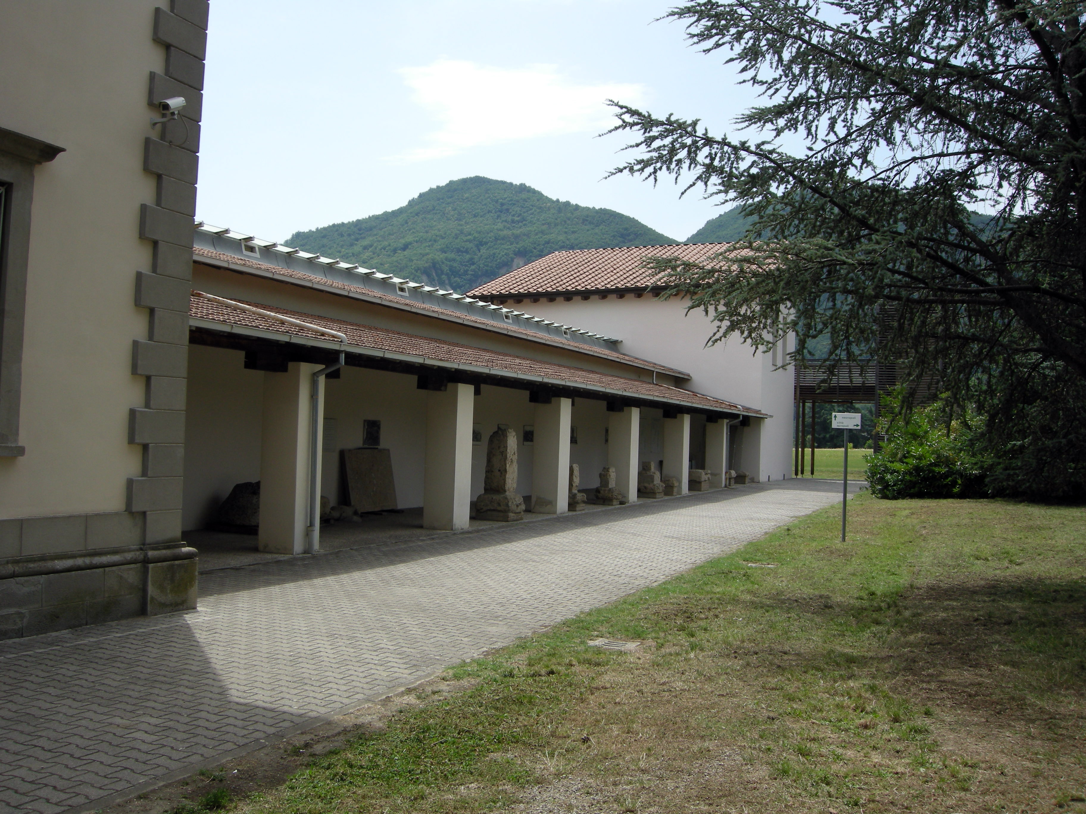 Emilia Romagna